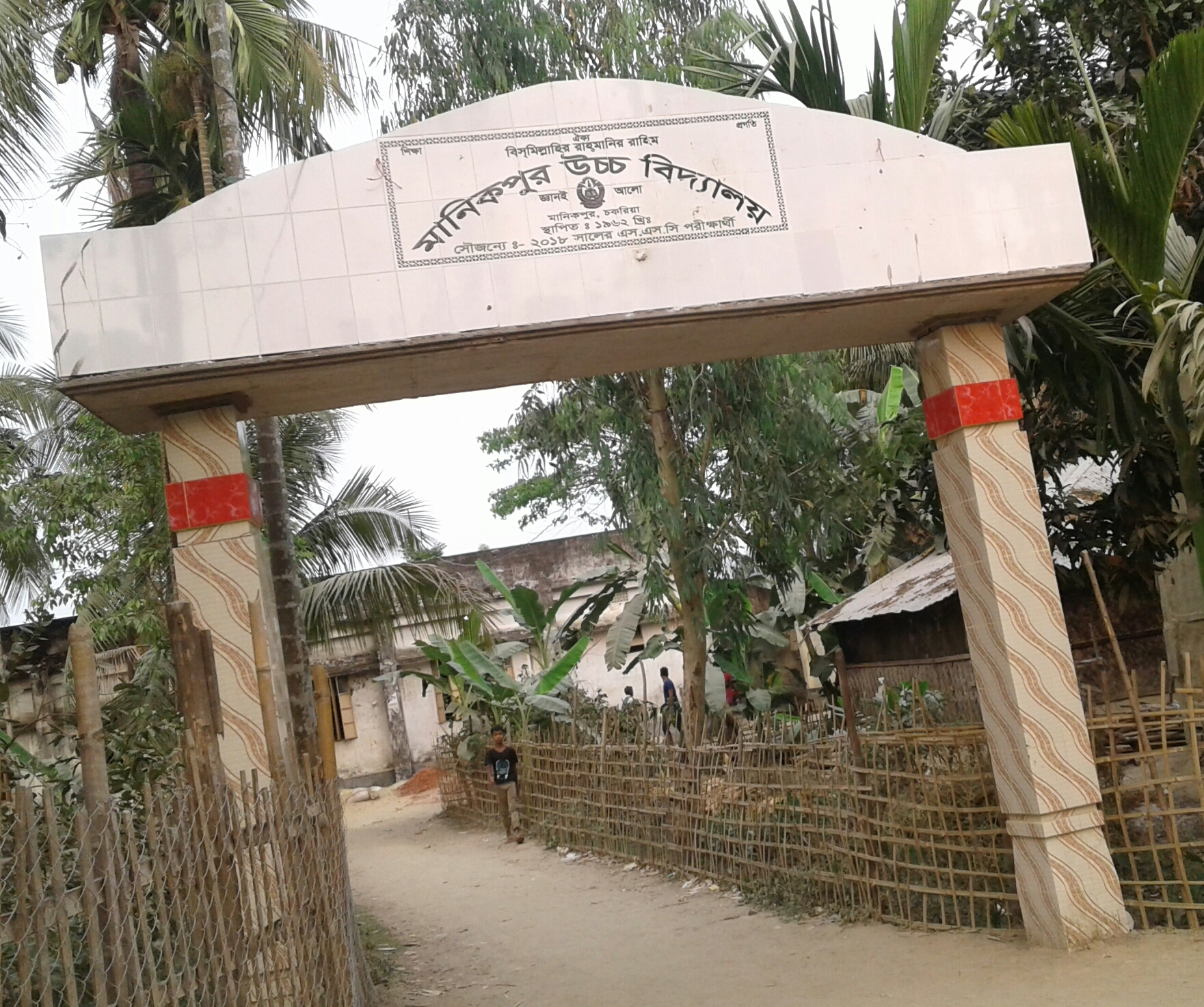 Manikpur High School মানিকপুর উচ্চ বিদ্যালয়ের প্রবেশপথ বা গেইট